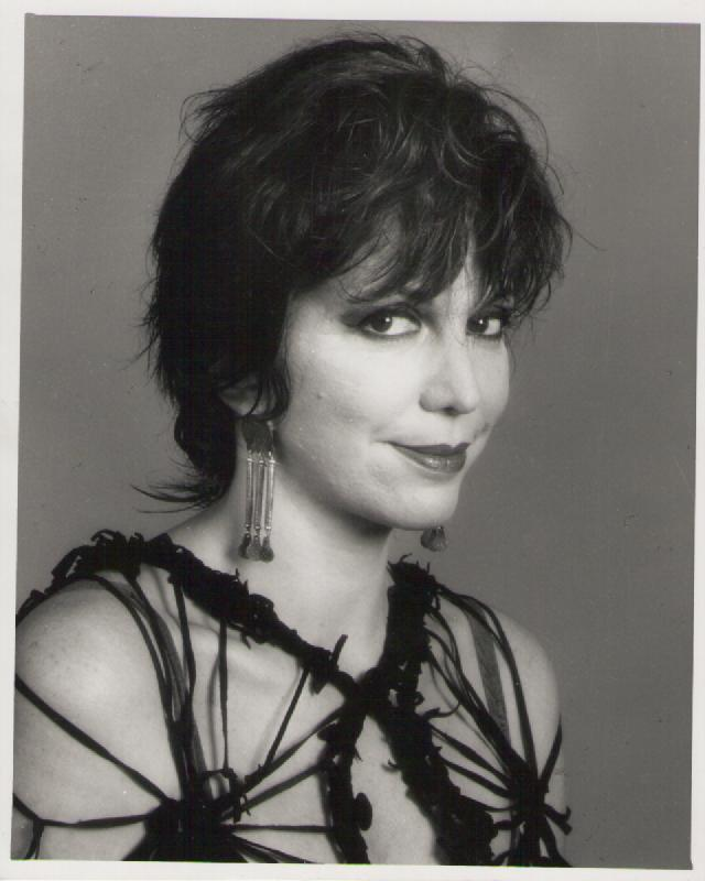 Cecilia Rossetto fotografiada por Oscar Balducci en 1993